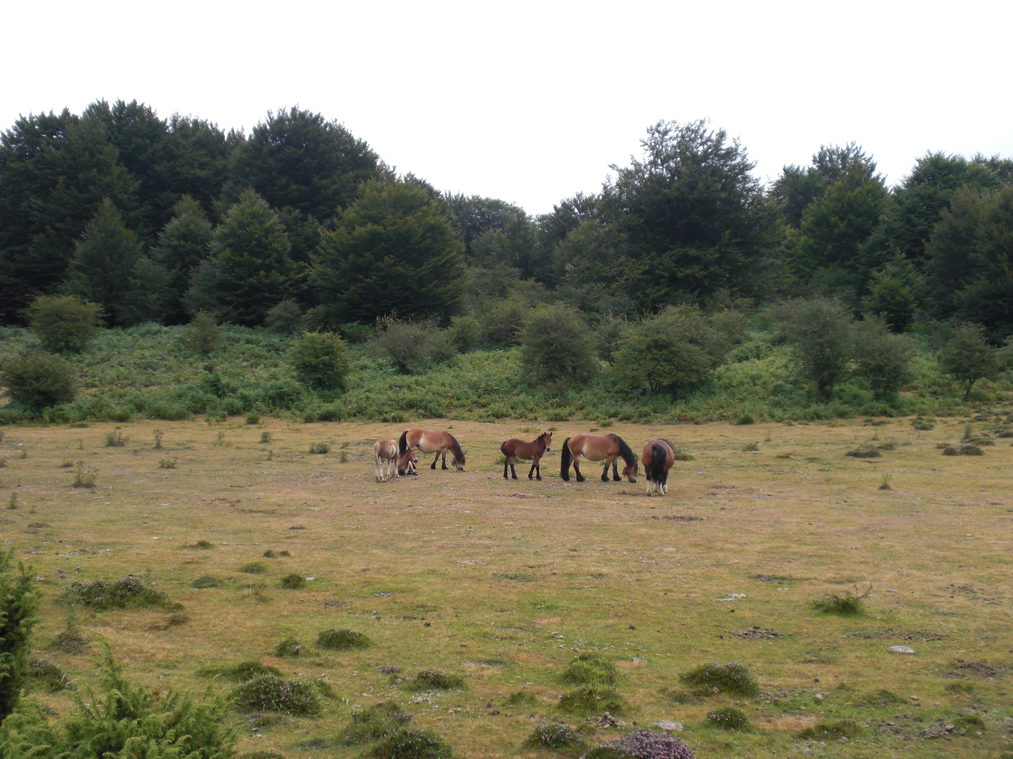 Zaldiak Entzia-Iturrietako Partzuergoan